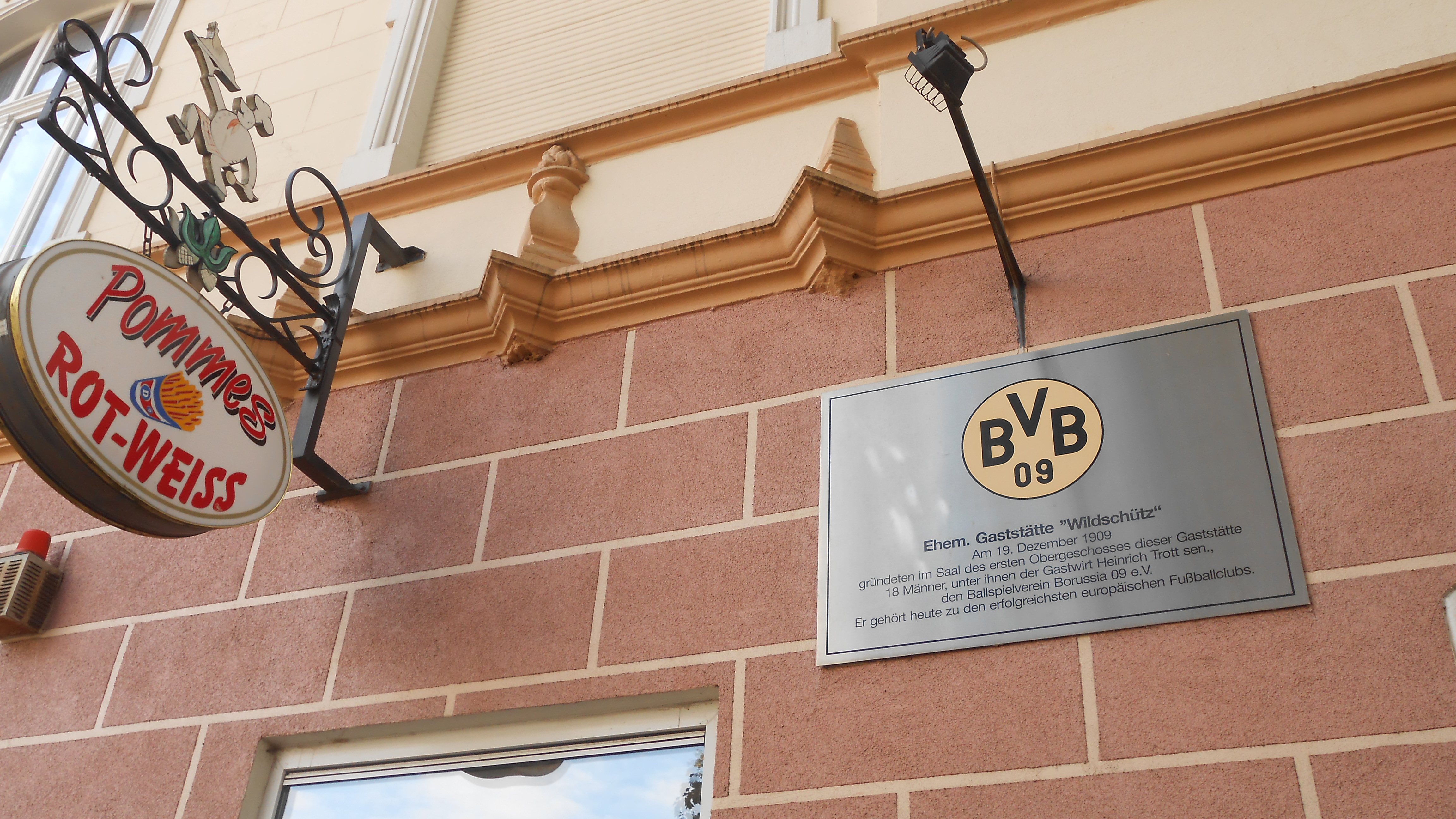 Gedenktafel an der Pommesbude Rot-Weiss, in der früheren Gaststätte Wildschütz nahe dem Borsigplatz, wo sich am 19. Dezember 1909 der BVB gründete.